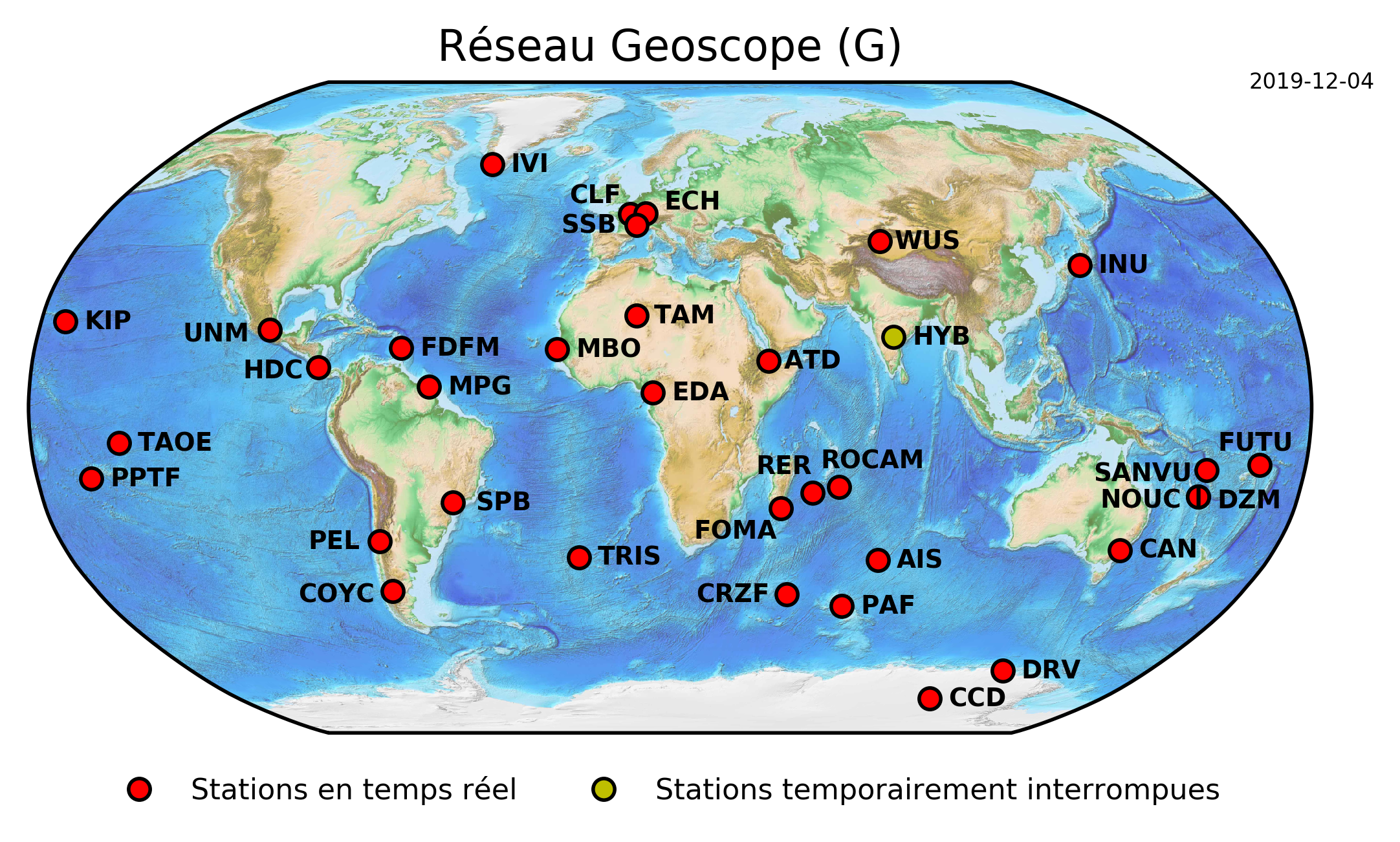 La carte des stations sismologiques du réseau Geoscope en décembre 2019